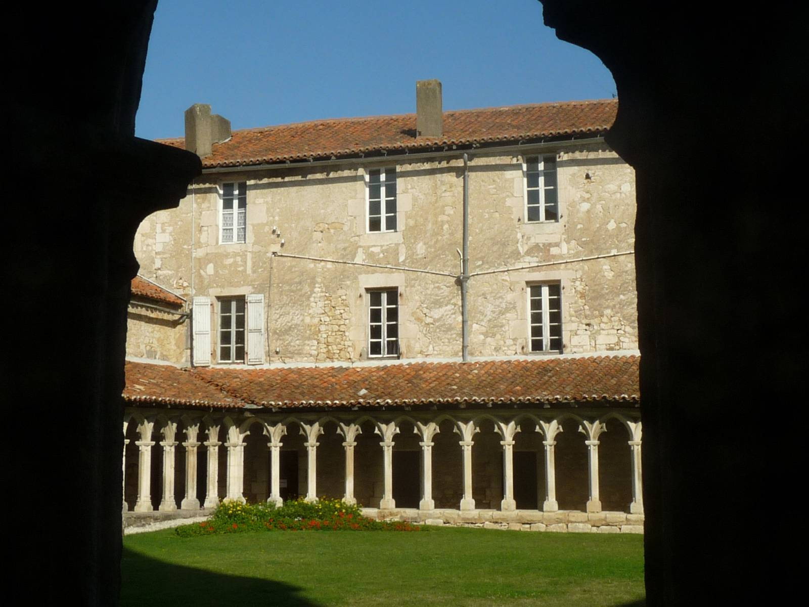 cloître de la Rochefoucauld (16), France